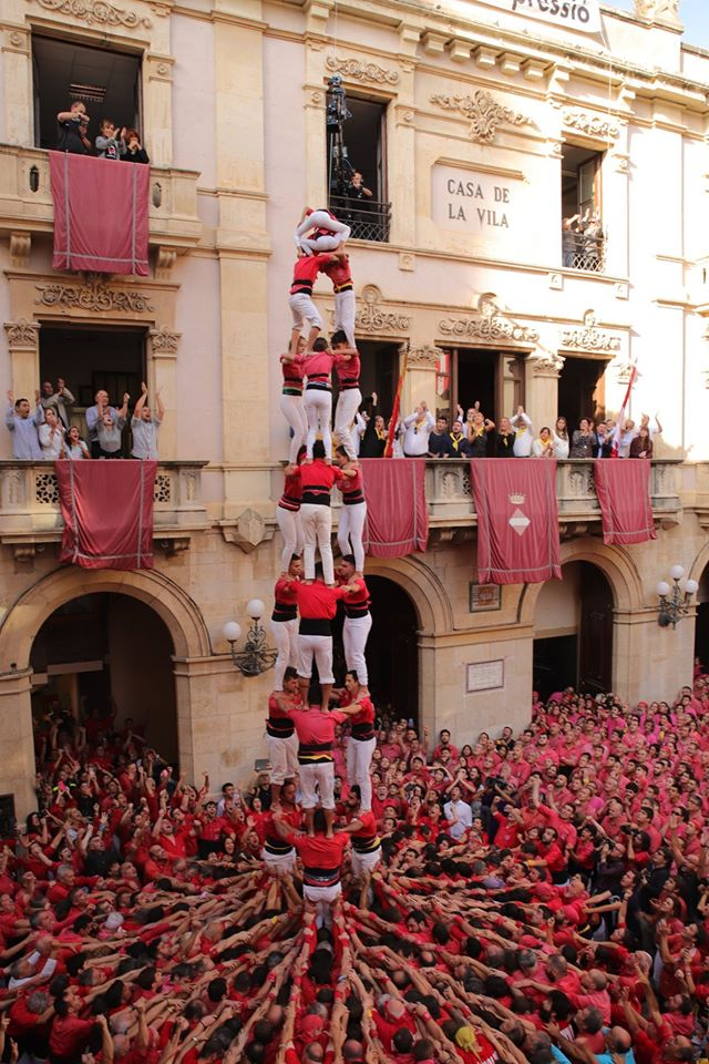 Primer 3 de 9 sense folre carregat de Colla Joves modernament durant la diada vallenca de Santa Úrsula, 27-X-2019. Foto de; Roser Giner Rius.